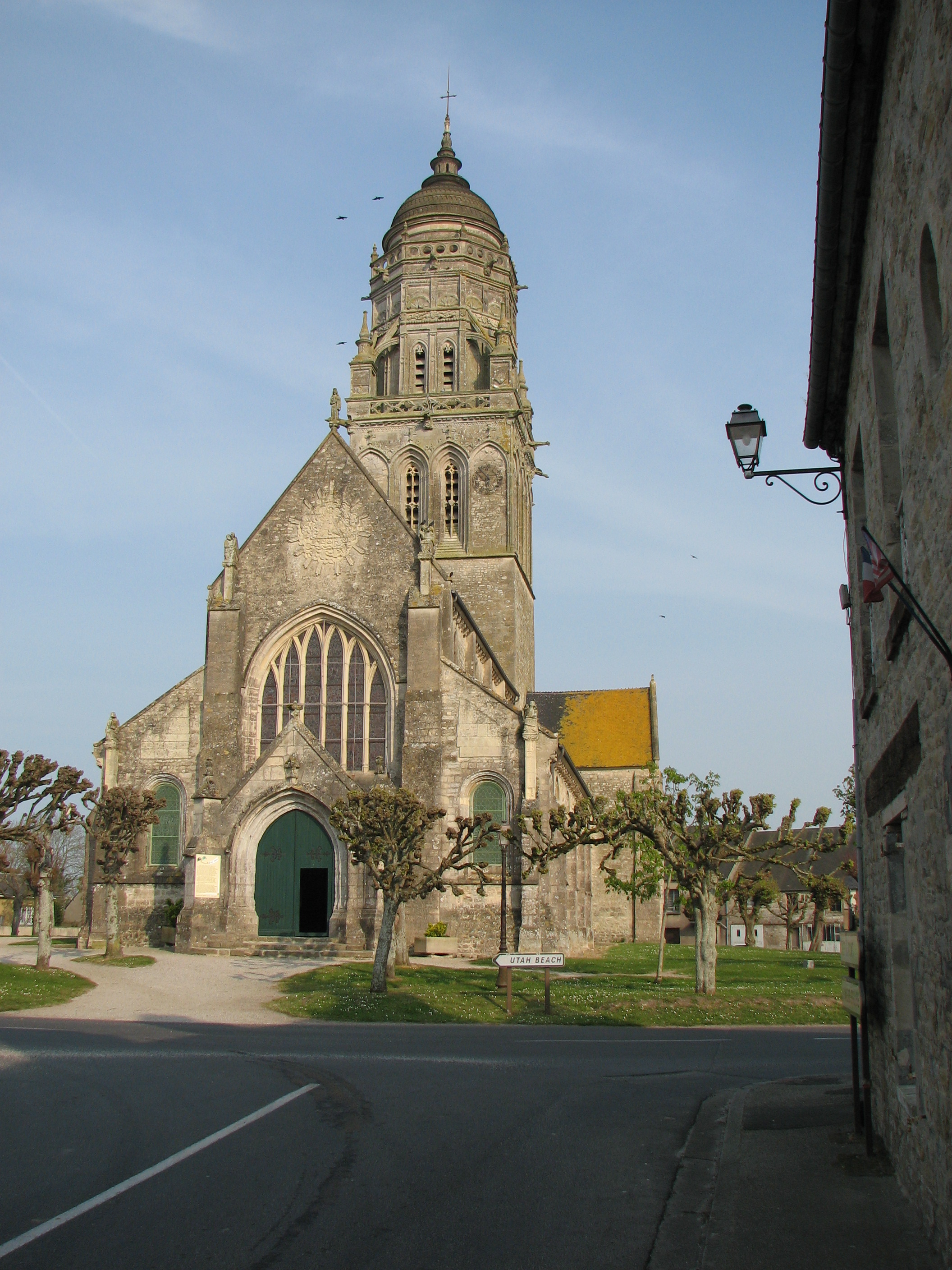 Eglise de Sainte-Marie-du-Mont, Manche, NormandieSainte Marie du Mont churche, Normandy (near Utah Beach)